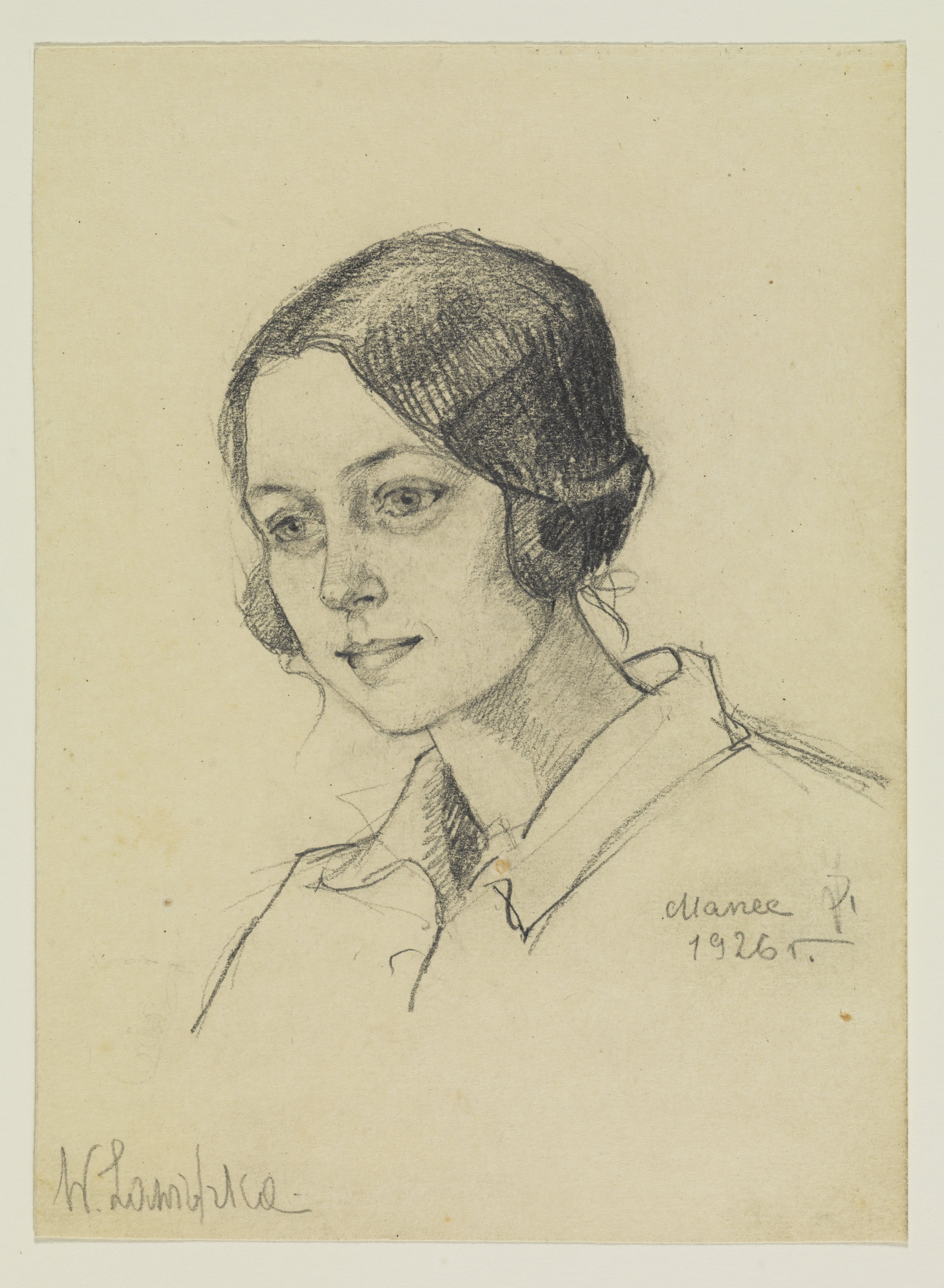 Wanda Zawidzka-Manteuffel